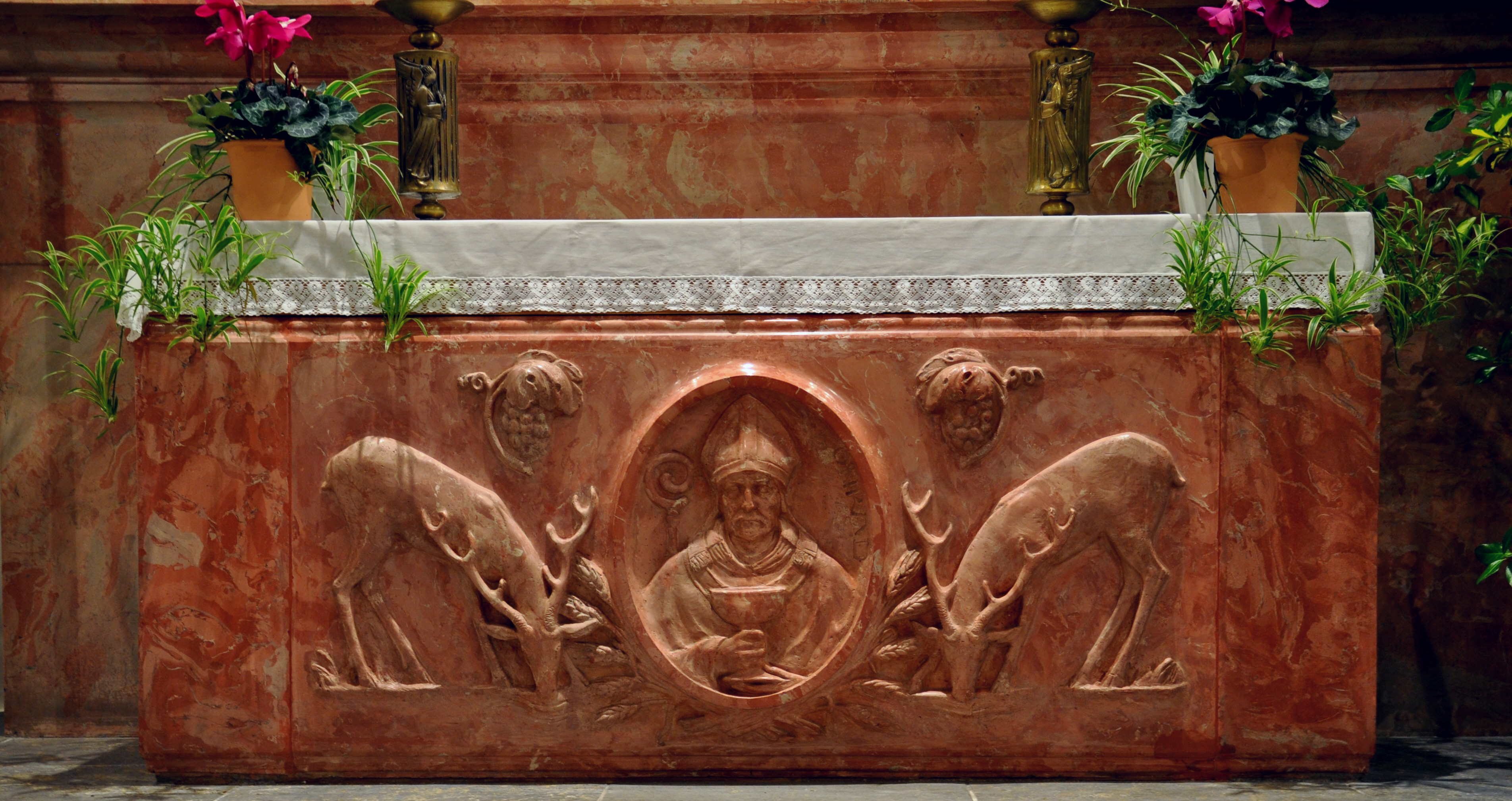 Levertsweiler (Gemeinde Ostrach), Katholische Pfarrkirche St. Luzia Hochaltar, Mensa mit Relief zu Psalm 42 "Wie der Hirsch lechzt nach frischem Wasser, so lechzt meine Seele, Gott, nach dir. " und Medaillon mit dem hl. Konrad von Konstanz